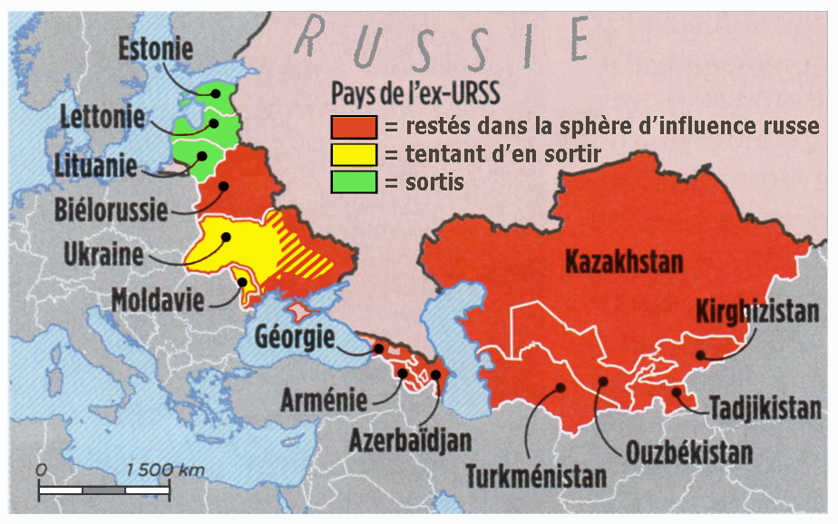 Situation géopolitique du glacis russe en 2014